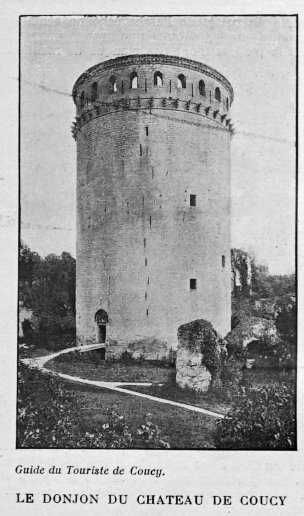 publié dans le "Bulletin de l'œuvre des voyages scolaires".